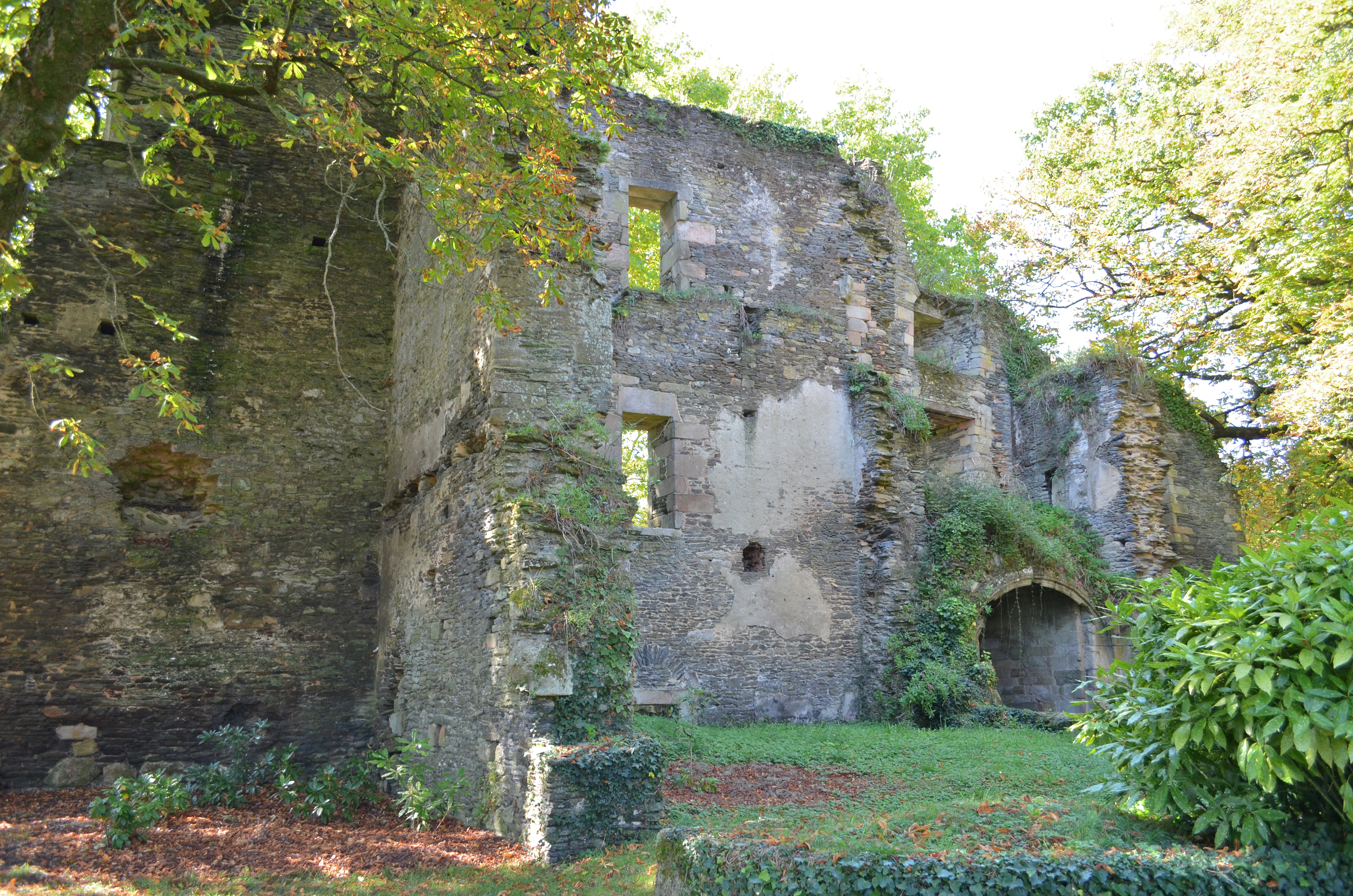 Château de Rochefort-en-Terre (Morbihan) .